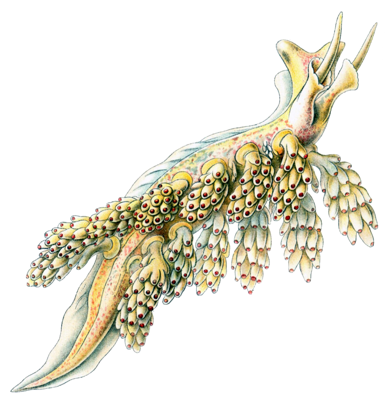 Doto coronata (Lovén) = Doto coronata (Gmelin, 1791)